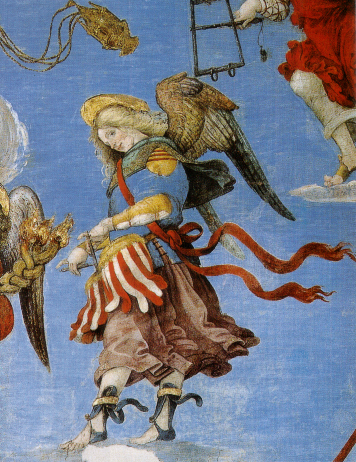 Filippino lippi, cappella carafa, assunzione, angelo